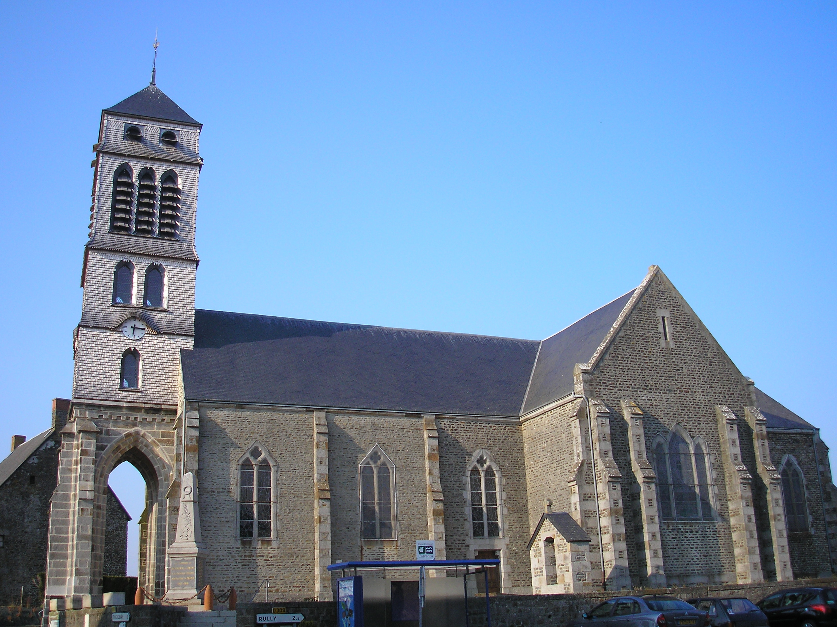 Bernières-le-Patry (Normandie, France). L'église Saint-Gerbold.